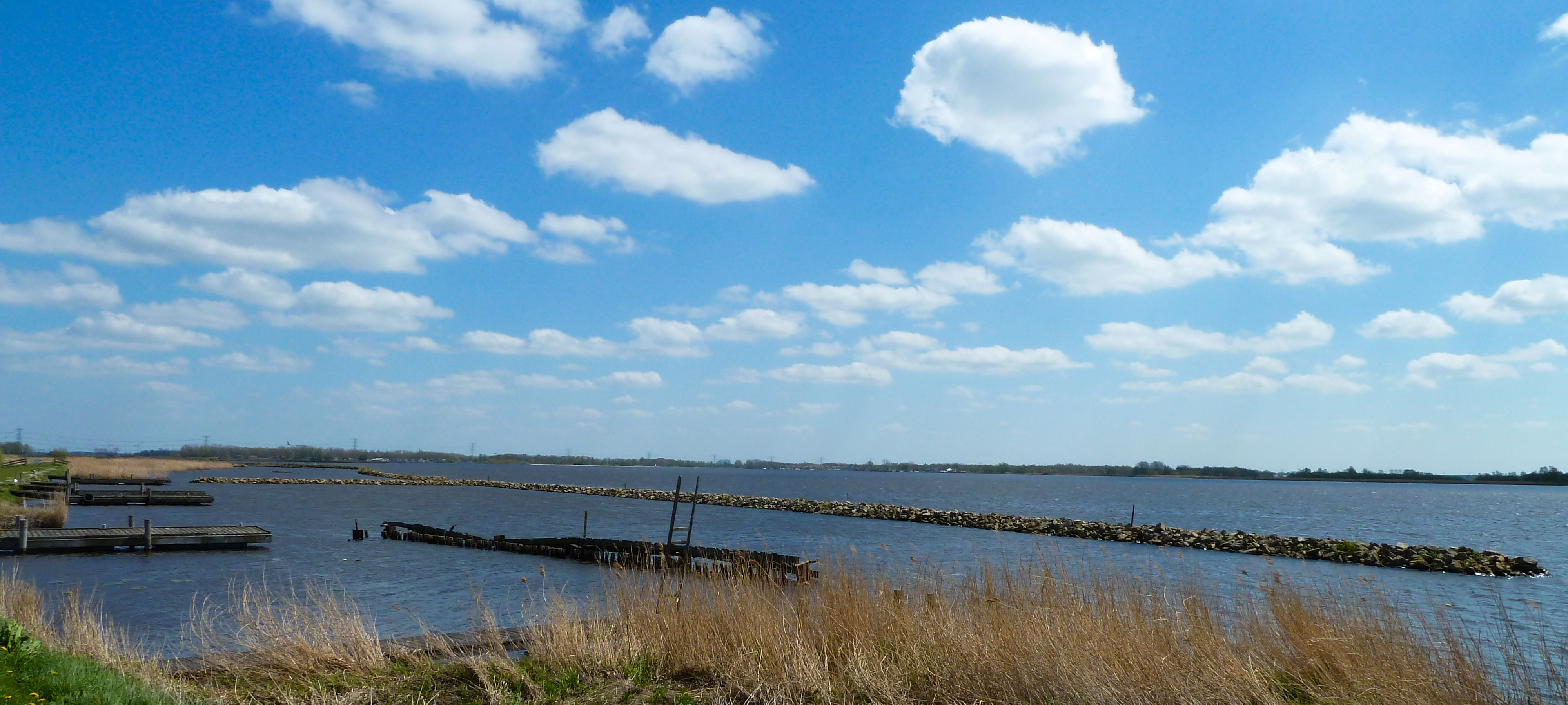 Gezicht over het Schildmeer vanaf het fietspad aan westzijde van het meer